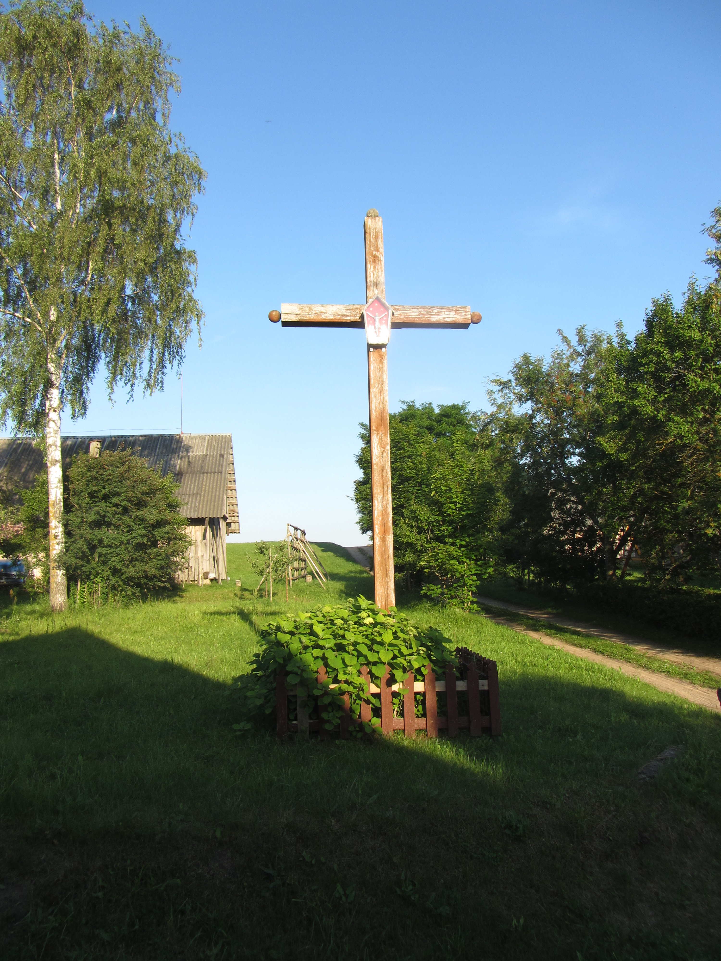 Didžiasalis 30197, Lithuania